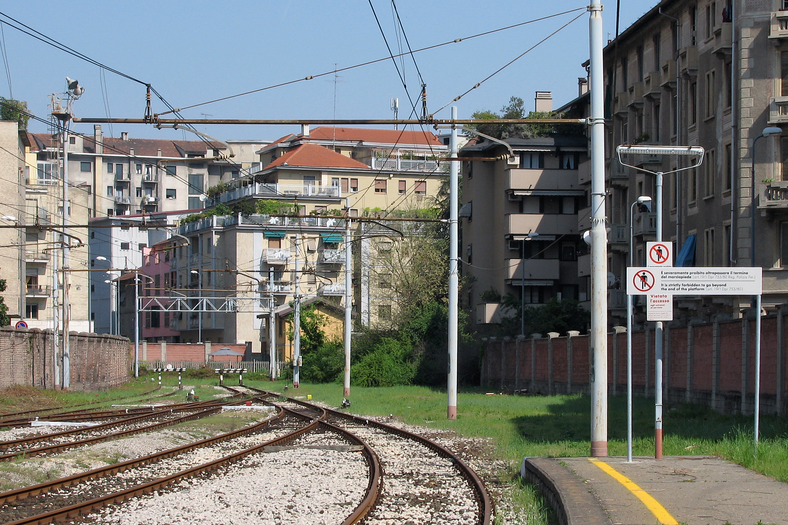 Vista delle aste di manovra della stazione di Milano Porta Genova; fino al 1931 i binari proseguivano verso Milano Sempione per poi giungere alla vecchia Stazione Centrale.